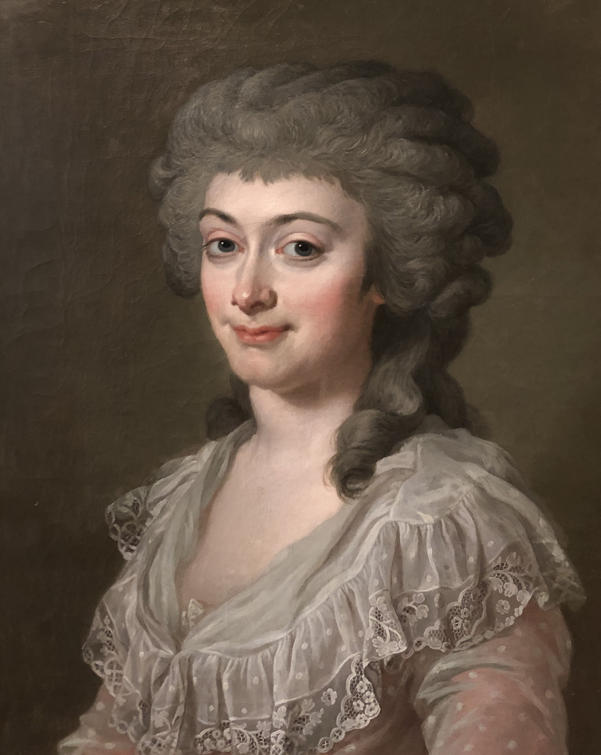 Hedvig ”Hedda” Eleonora von Fersen, gift Klinkowström. Avporträtterad ca 1790 av Lorens Pasch d.y.